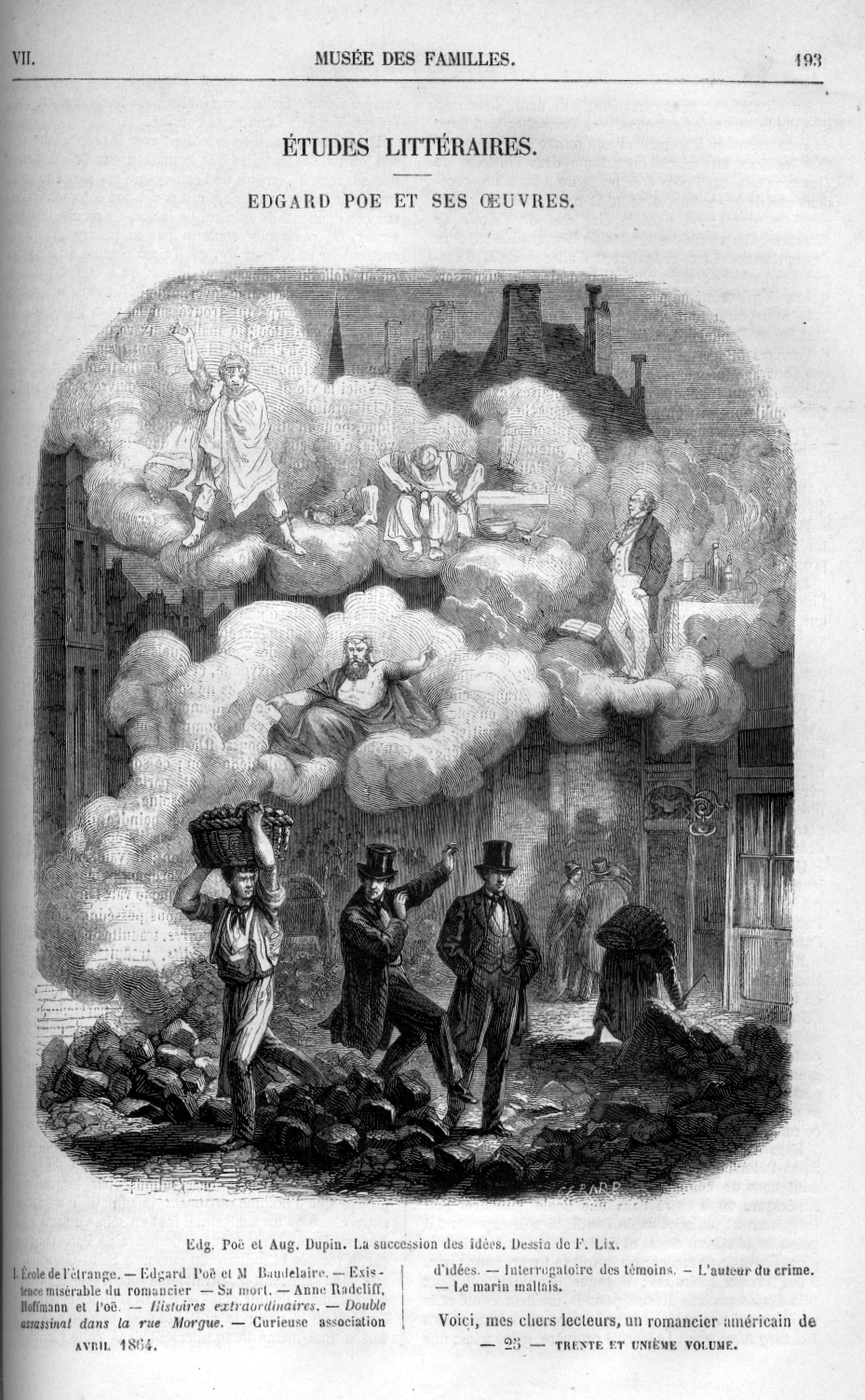 Jules Verne: Edgard Poe et ses œuvres, 1864 erschienen in Musée des Familles.